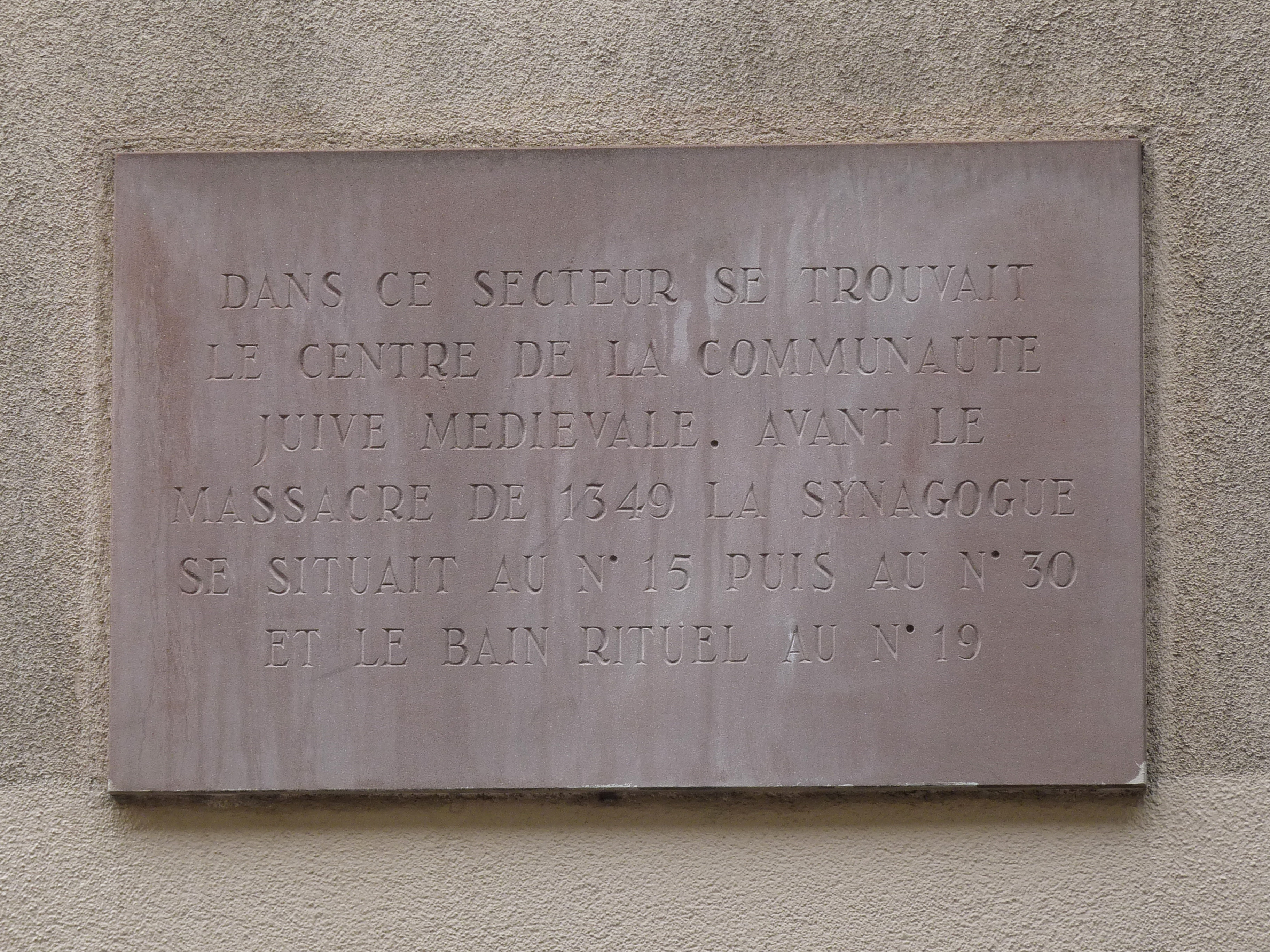 Strasbourg : plaque en grès apposée dans la rue des Juifs avec l'inscription suivante : "Dans ce secteur se trouvait le centre de la communauté juive médiévale. Avant le massacre de 1349 la synagogue se situait au n° 15 puis au n° 30 et le bain rituel au n° 19"